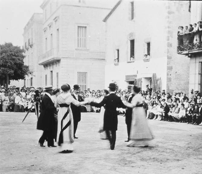 Tradicional “ball de plaça” que es balla per la festa major de Santa Cristina de Lloret de Mar